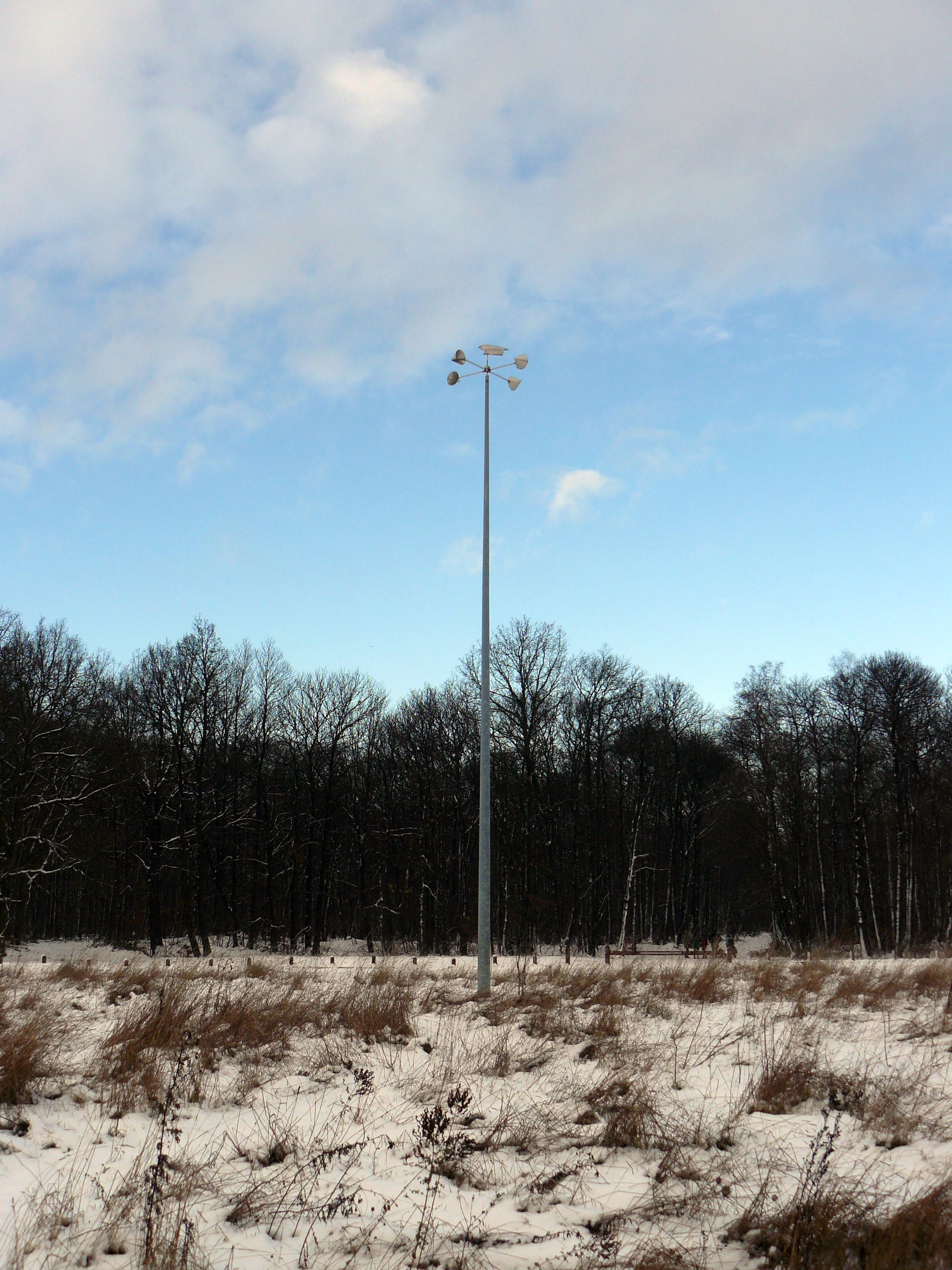 L'anémomètre du Bois de Clamart (Forêt de Meudon), au Carrefour de l'Anémomètre (Hauts-de-Seine, France)